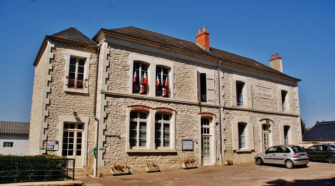 La Mairie